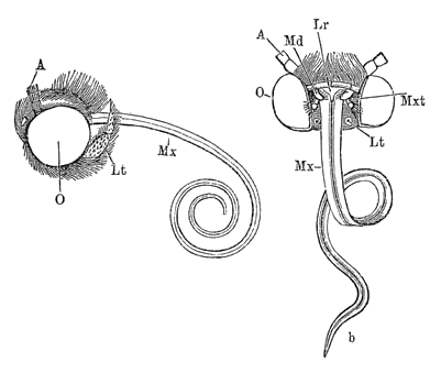 Mundteile von Schmetterlingen. a von Zygaena, b von Noctua. (Mundteile von Insekten.) A Antennen, Gl Zunge, H Stechborste, Lb Unterlippe, Lbr Oberlippe, Lt Lippentaster (Labialtaster), Md Mandibeln, Mx Maxilla (Rüssel), Mxt Maxillartaster, O Augen Oc Nebenaugen, Pg Nebenzungen.